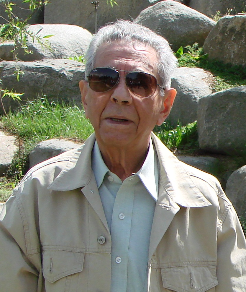 اسكندر فيروز